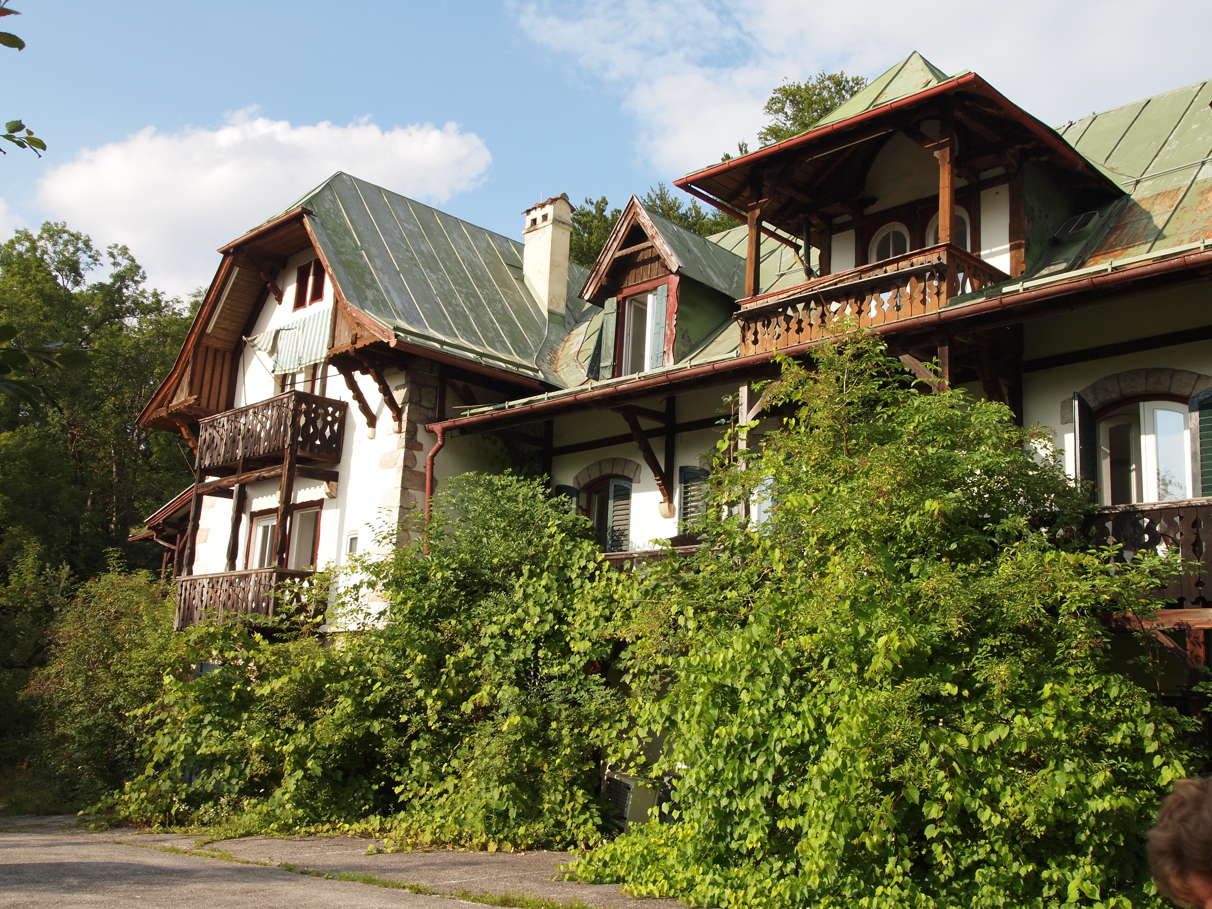 Hotel Geiger Aussenansicht Logierhaus